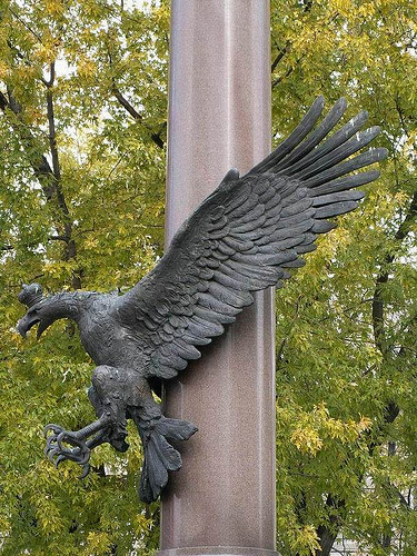 Pomnik 1 Dywizji Pancernej gen. St. Maczka na placu Inwalidów na warszawskim Żoliborzu Generał Stanisław Maczek Żoliborz